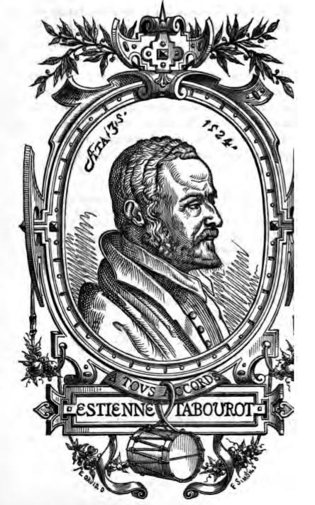 Etienne Tabourot, from Les bigarrures du seigneur Des Accords, avec Les apophthegmes du sieur Gaulard et Les escraignes ... by Étienne Tabourot et Guillaume Colletet. Paris, 1866.